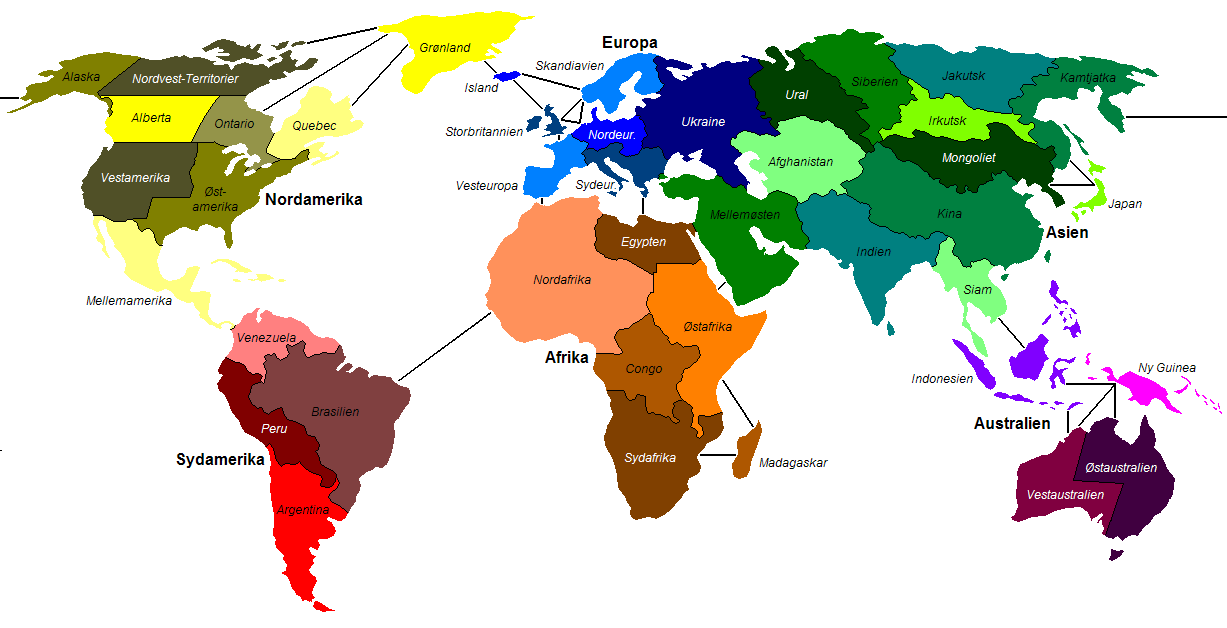 Et Risk-spillebræt